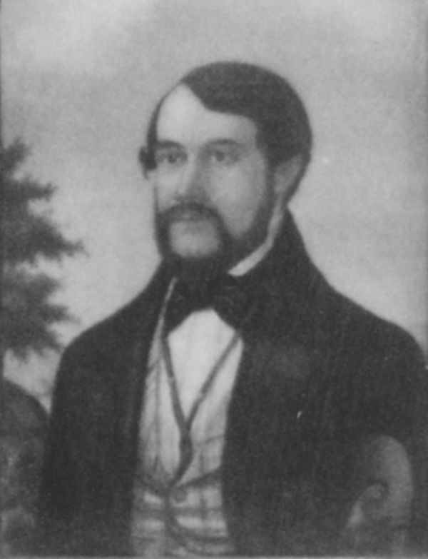 Gustav Mayer (1810–1852), Porzellanminiatur ca. 10 x 15 cm, gemalt 1850, reprod. in Kraichgau 17, 2002, S. 259. Original in privatbesitz, Kopie im Stadtmuseum Sinsheim.